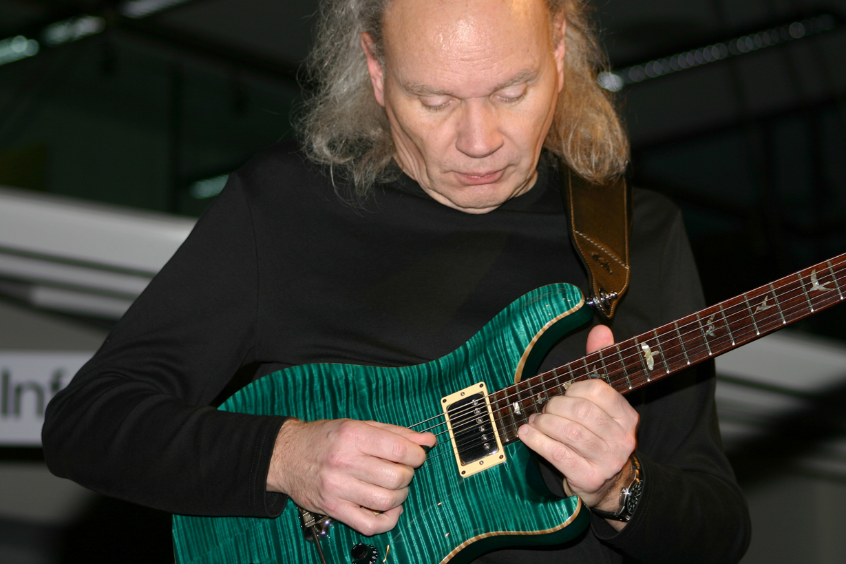 Jazz-Gitarrist Jochen Schrumpf während eines Life-Auftritts 2008